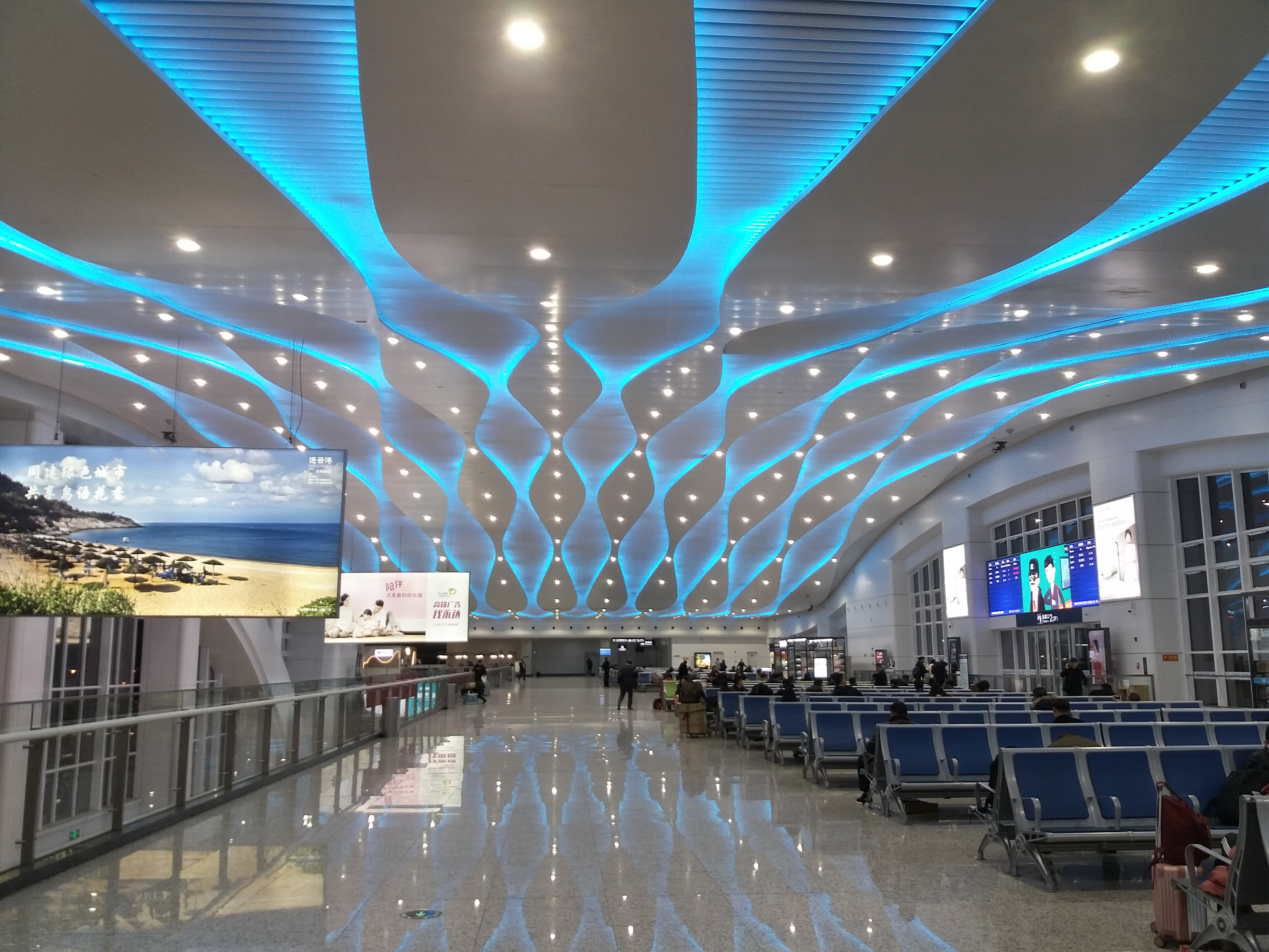 Inside Lianyungang Railway Station